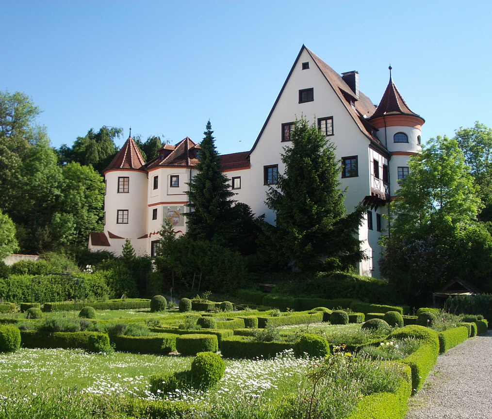 Neufra an der Donau, Riedlingen, Germany: Schloss mit Hängegarten